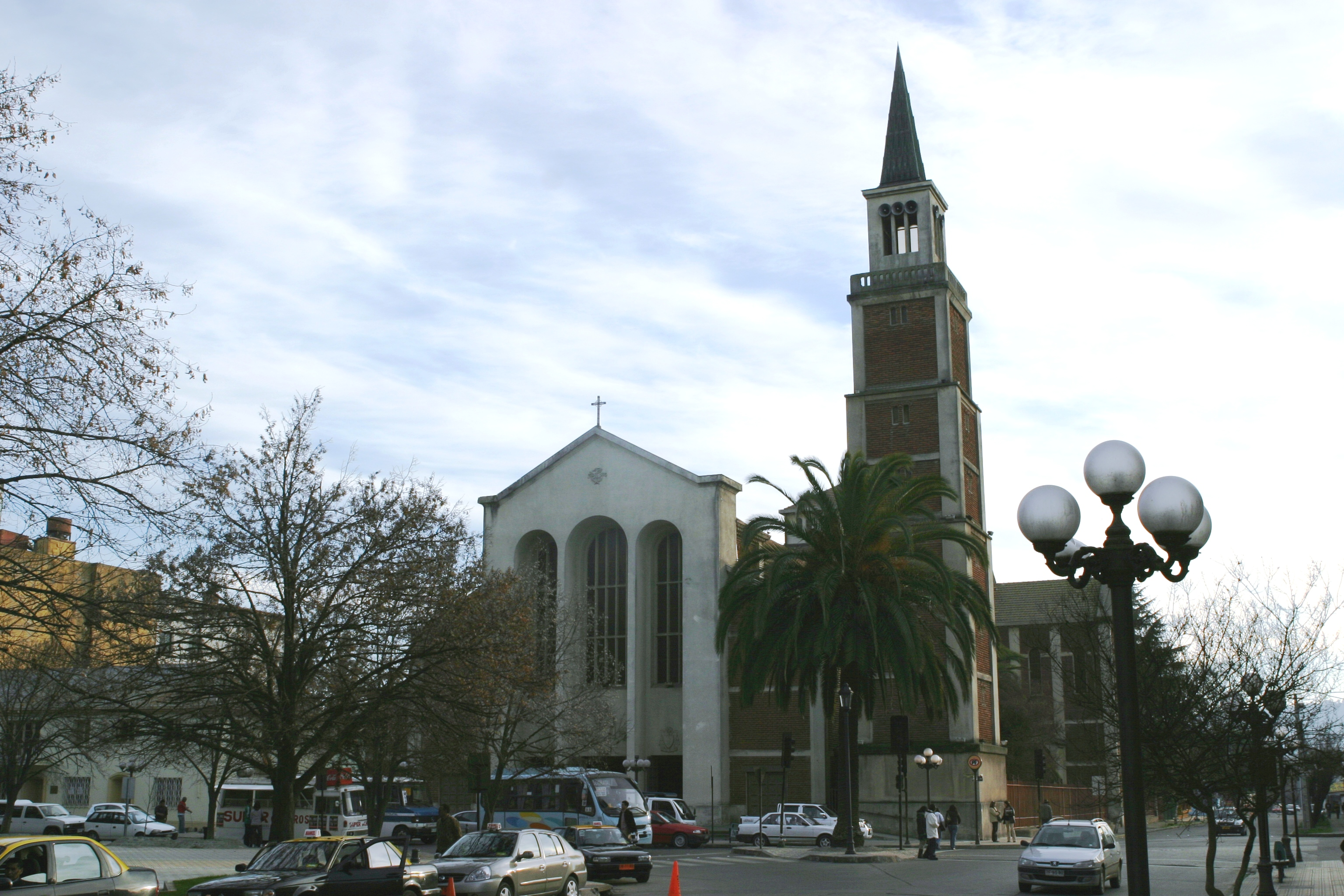 La Catedral de la ciudad de Talca.